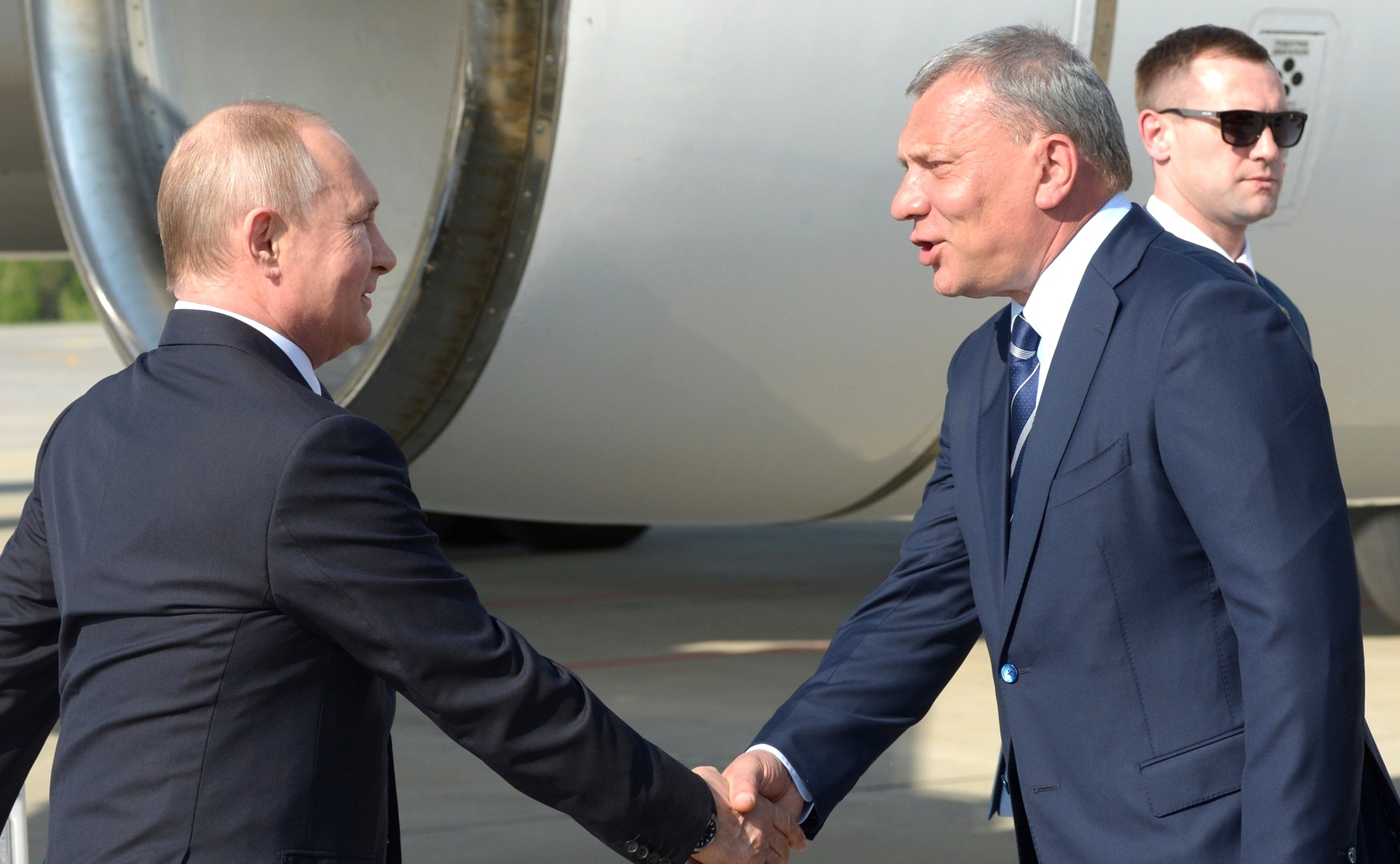 Перед посещением Казанского авиационного завода имени С.П. Горбунова. Президент России Владимир Путин с заместителем Председателя Правительства Юрием Борисовым